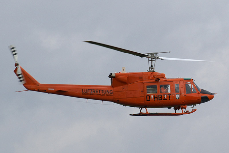 Bell 212 der Luftrettung des Bundesministeriums des Innern